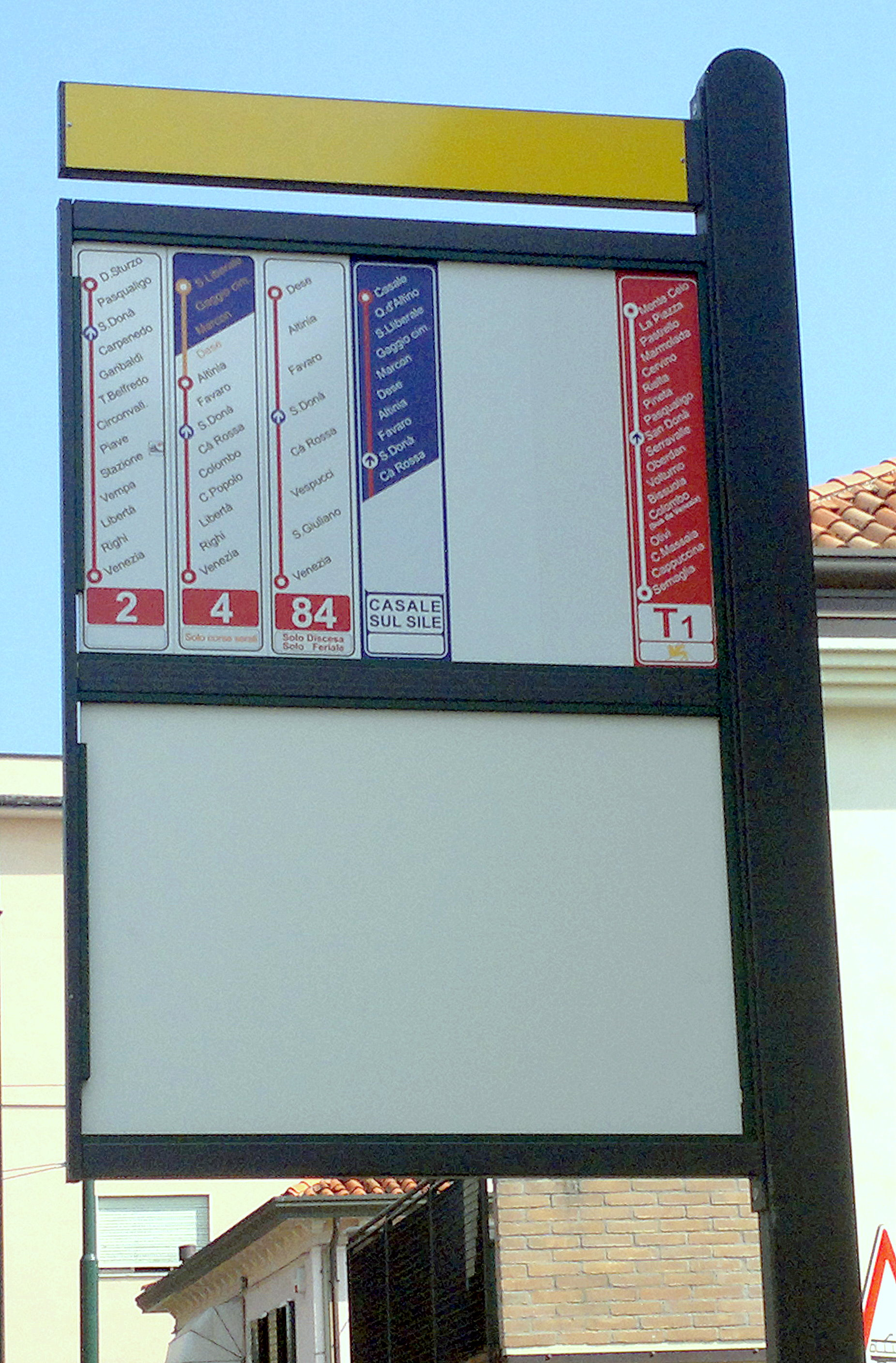 palina actv carpenedo